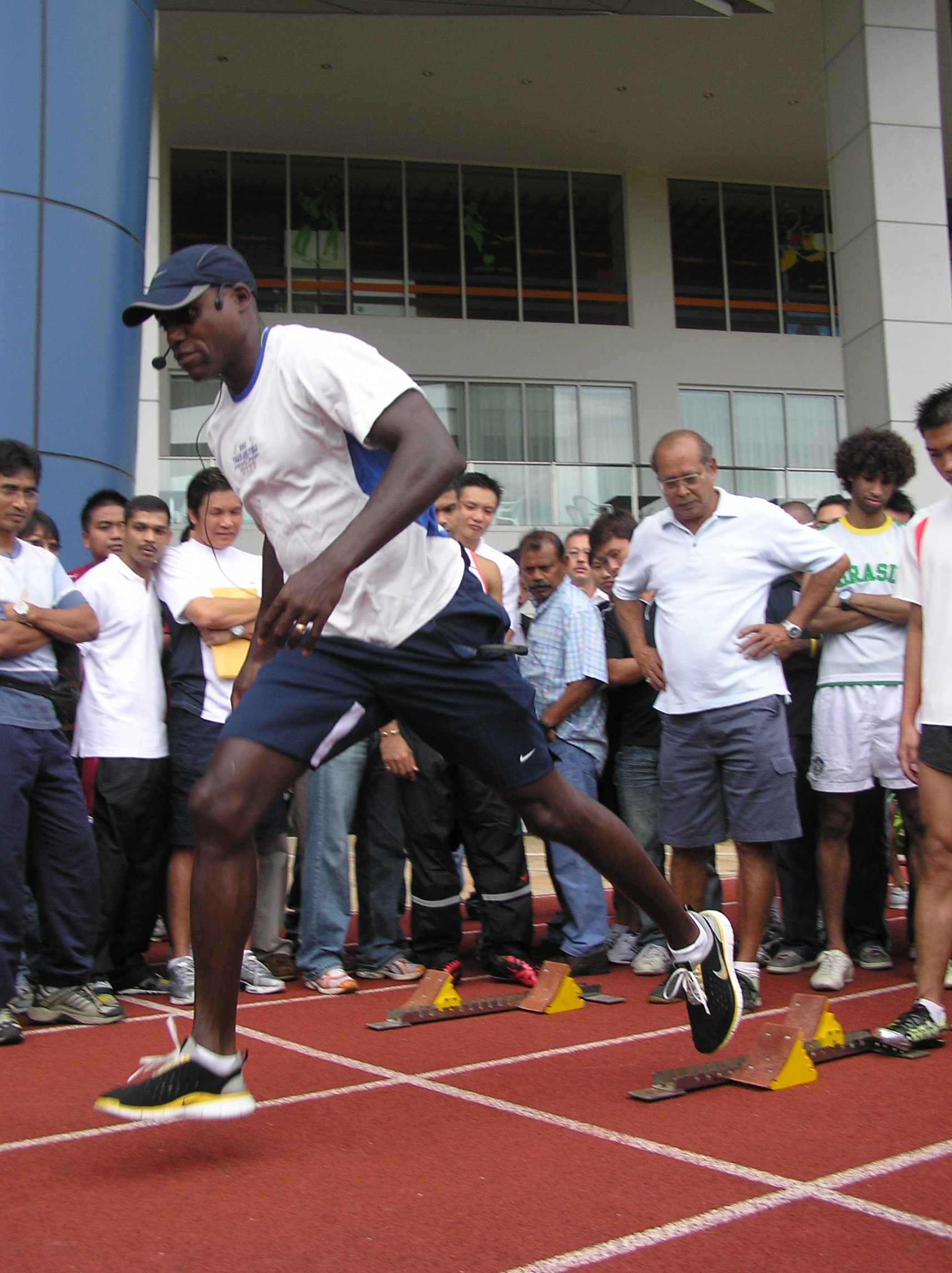 Carl Lewis in Singapore in 2006 Prise en 2006 Mise en ligne le 19 juin 2007